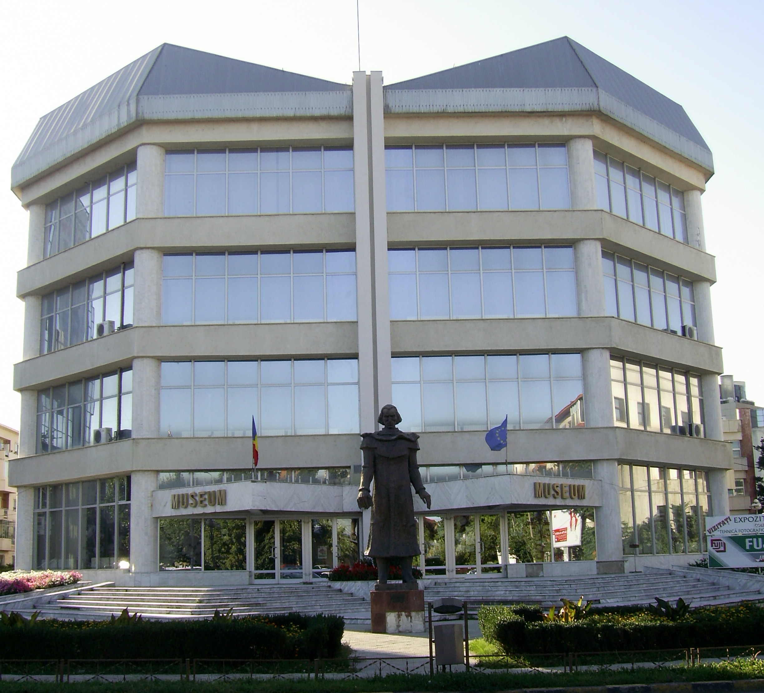 Complexul muzeal Iulian Antonescu di orașul Bacău